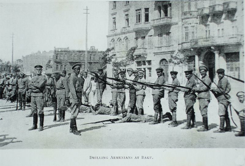 Drilling Armenians in Baku